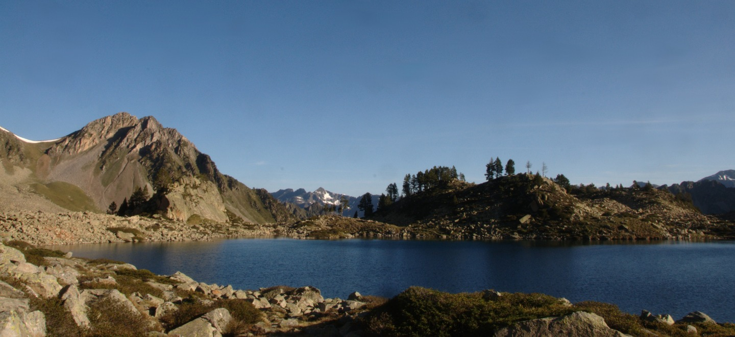 Le lac Nère. Au fond à gauche, le pic des Crampettes. Tout au fond, encore enneigée la pène deth Pouri